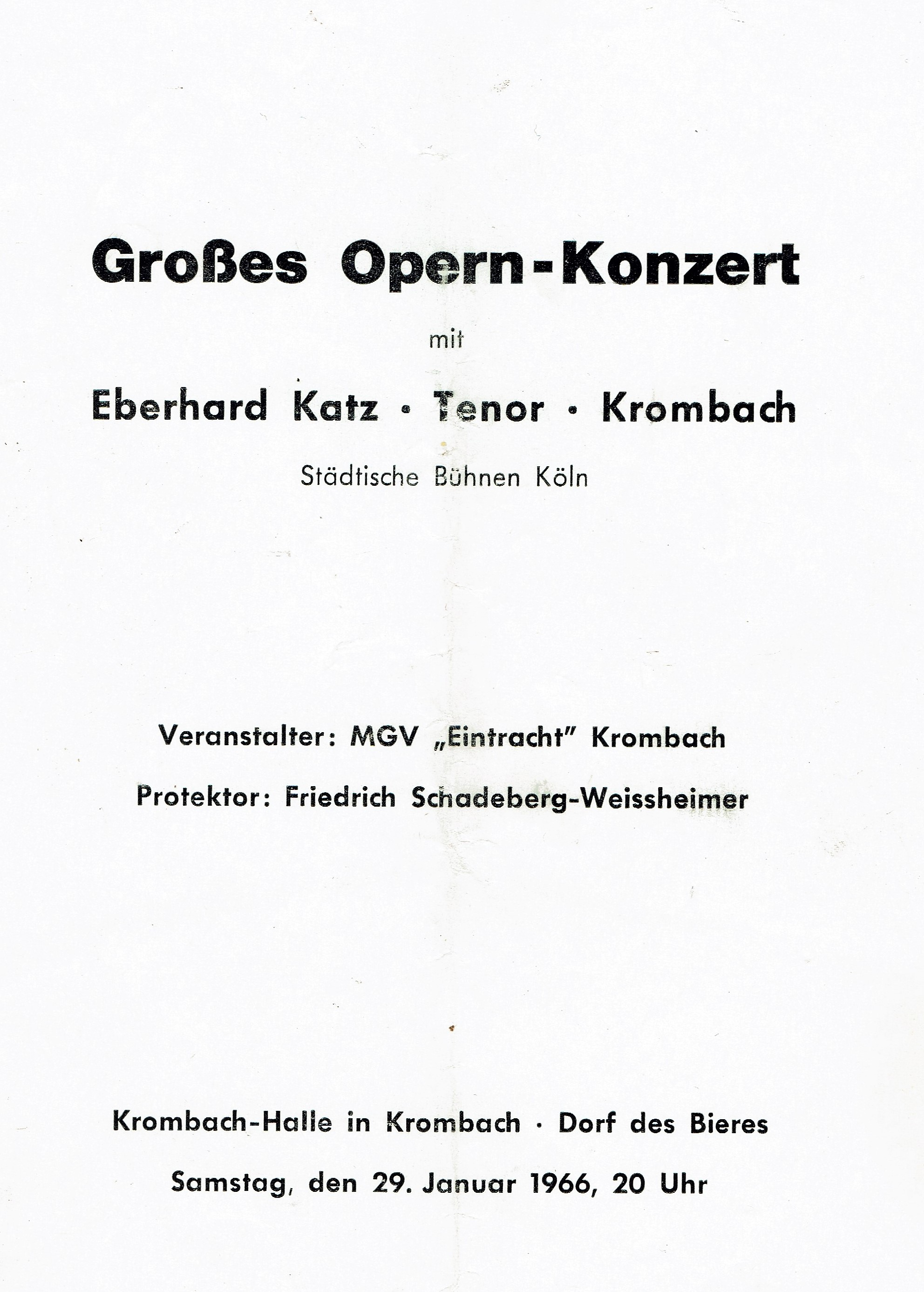 Deckblatt eines Programmheftes des MGV "Eintracht" Krombach zum Opernkonzert mit Eberhard Katz am 29. Januar 1966